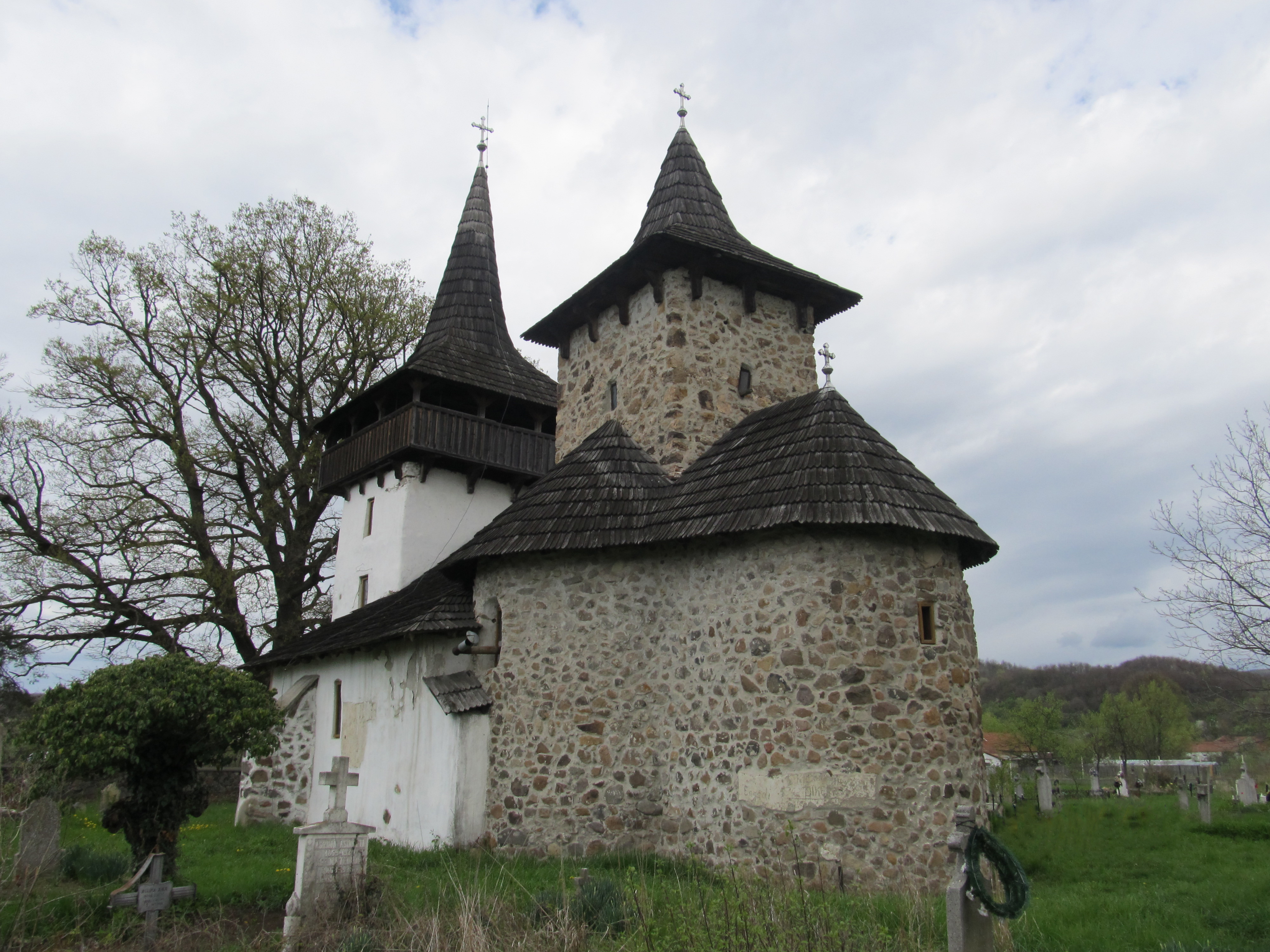 Die Kirche Sf. Arhanghel Mihail in Gurasada, Rumänien.